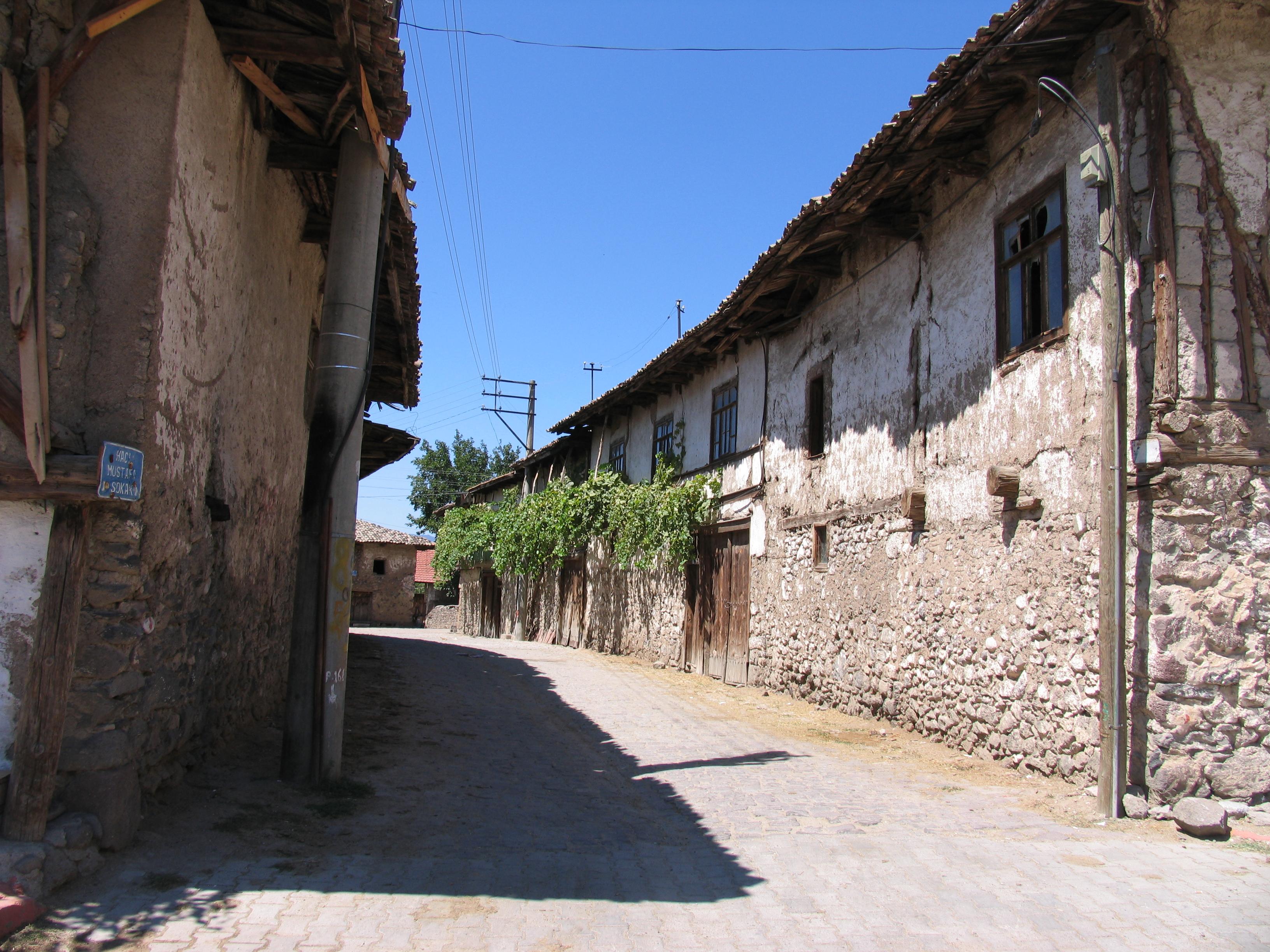 43500 Naşa/Simav/Kütahya, Turkey